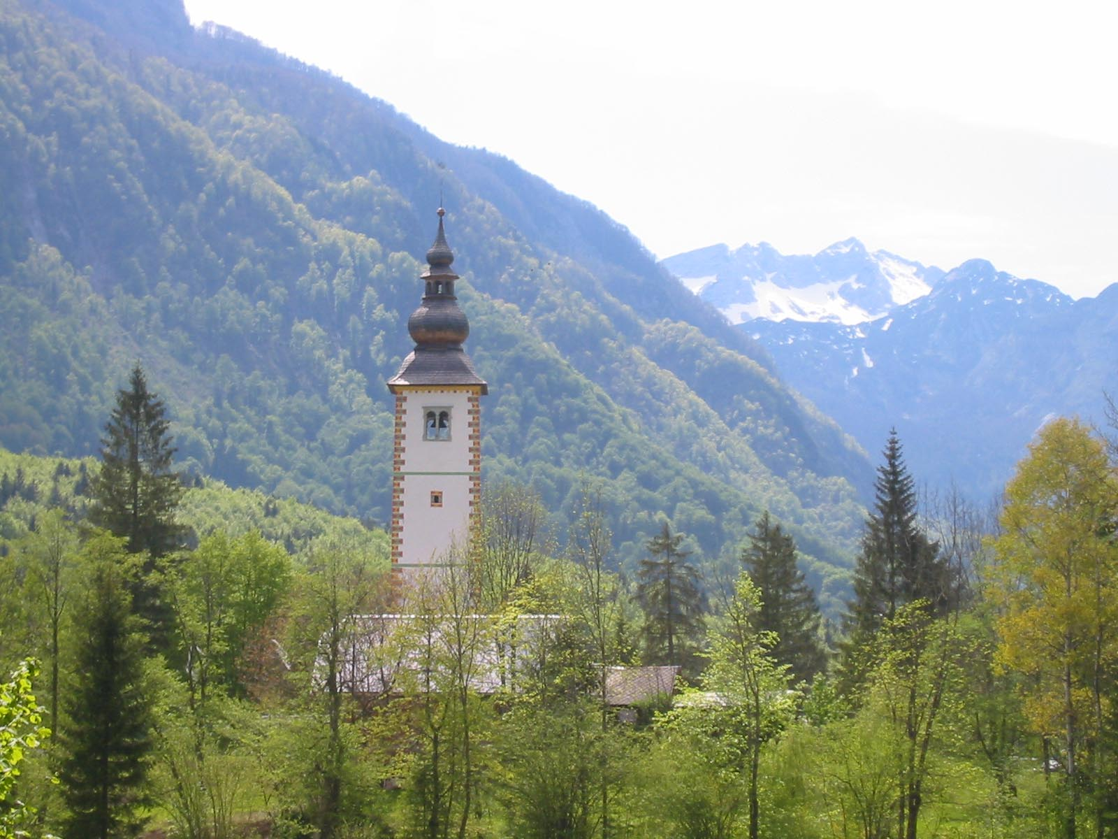 Sv. Janez, church near Bohinj Lake, Slovenia photo:Ziga 12:08, 16 April 2007 (UTC)